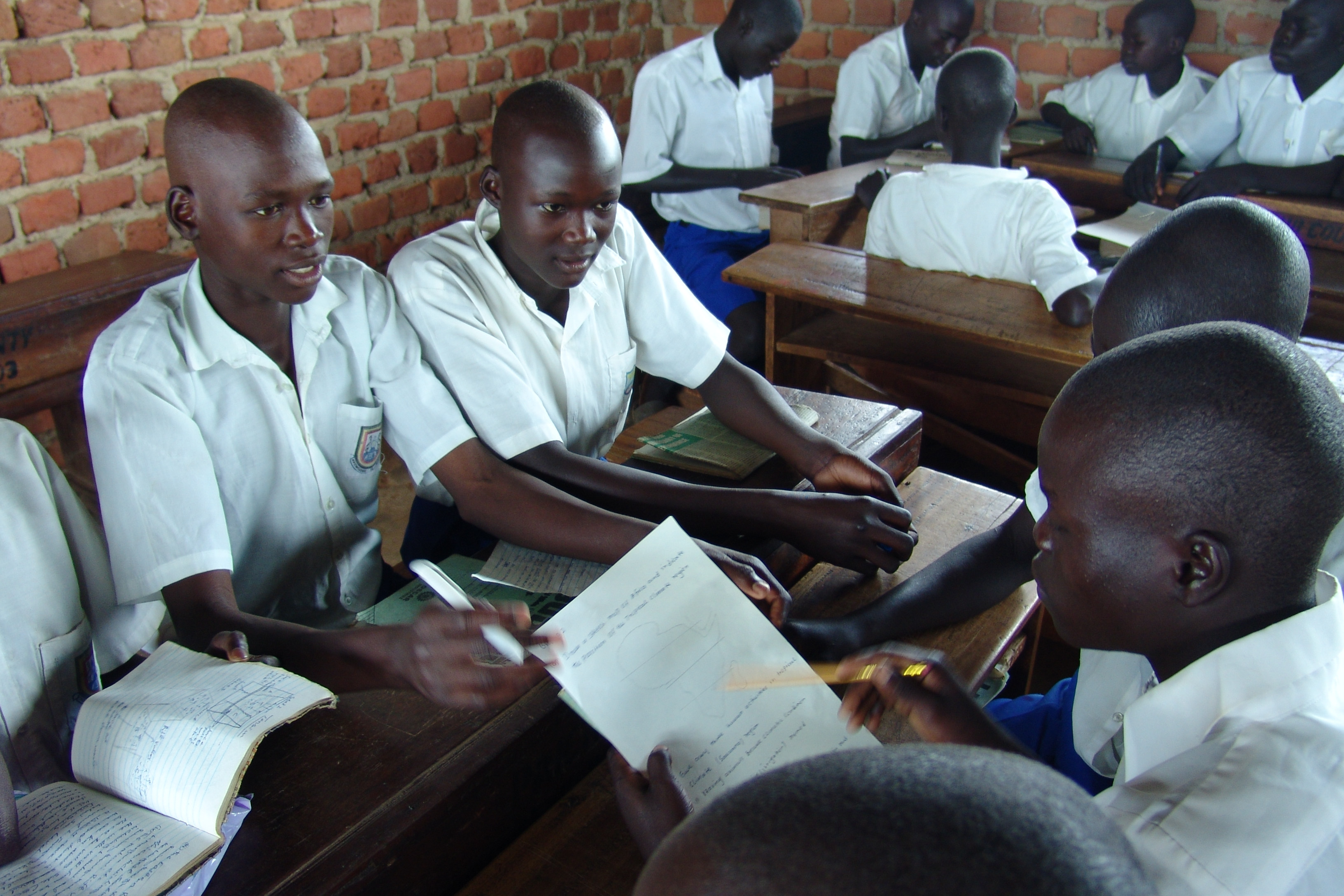 Students in Uganda